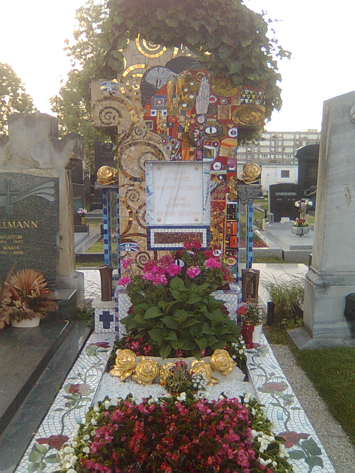 Schifrer Familien Grab von Bildhauer Franz Schifrer am Meidlinger Friedhof